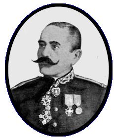 Ion Ivanovici (1845-1902)